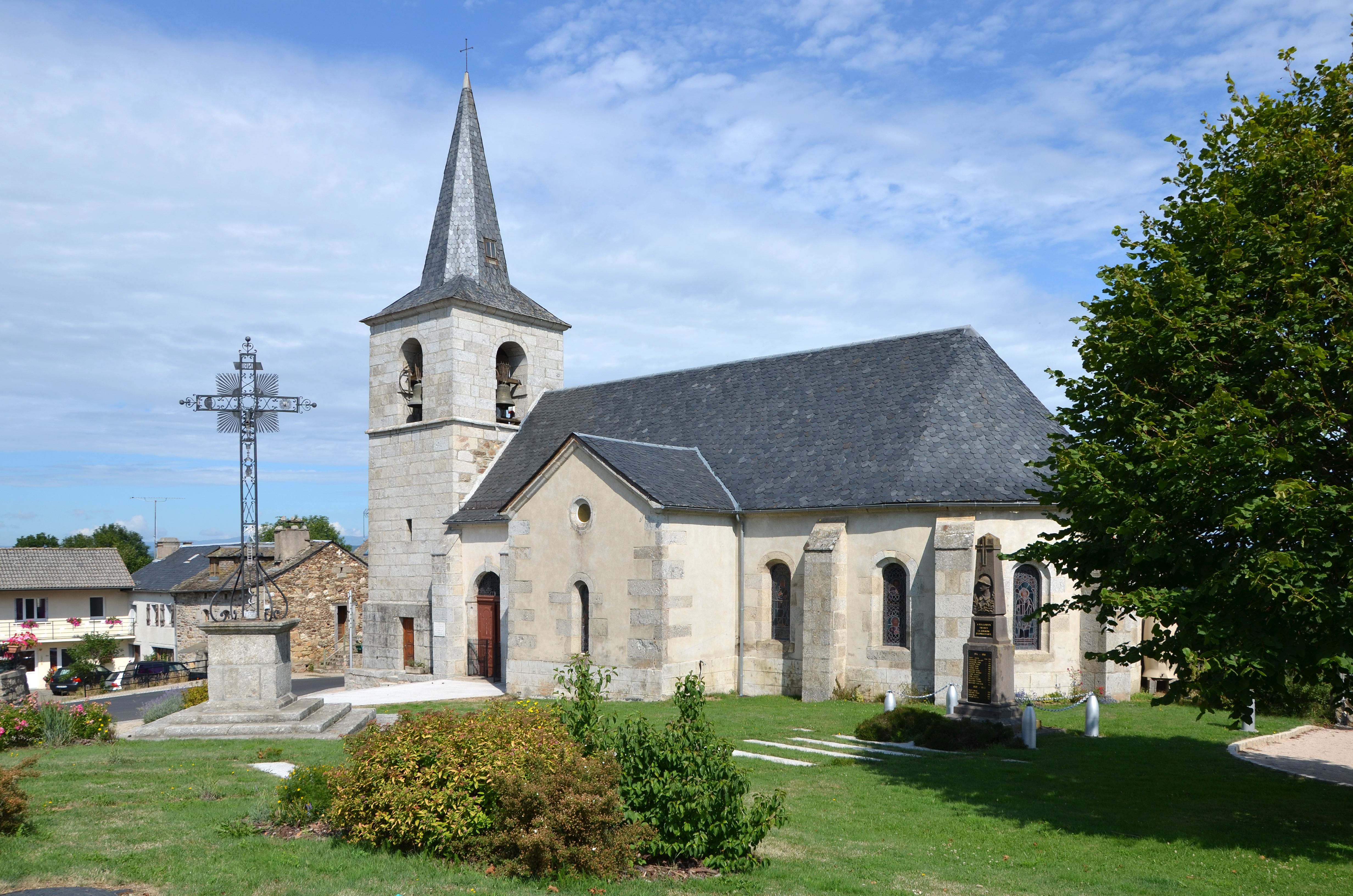 Eglise de Fridefont, Cantal, France